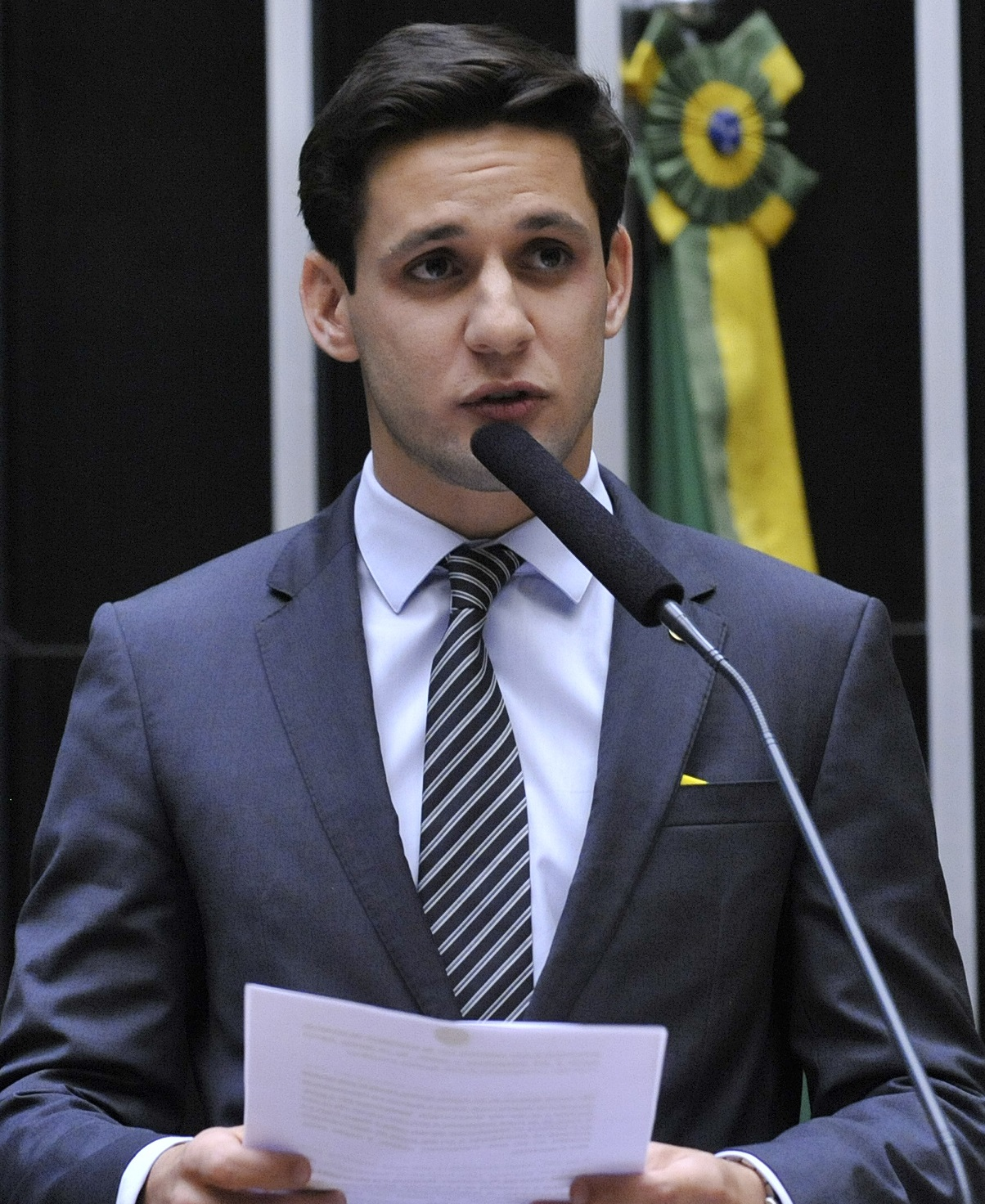 Rafael Motta em abril de 2016.